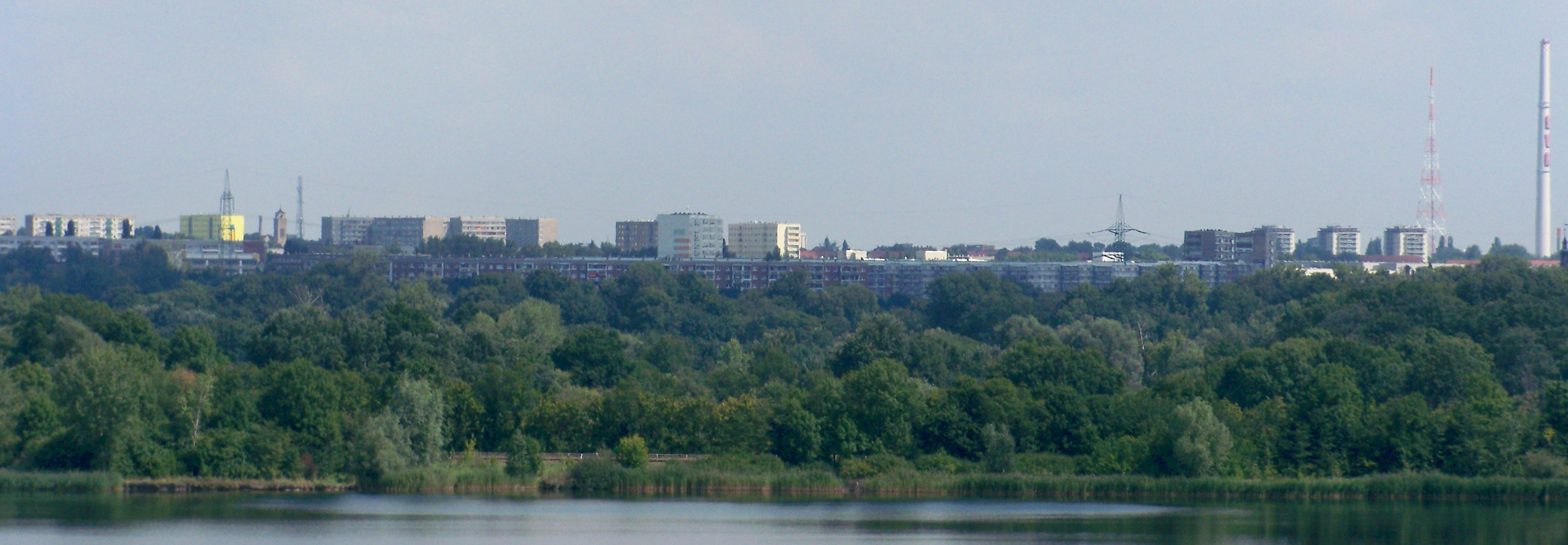 Skyline von Halle, Stadtteil Silberhöhe, über den Rattmannsdorfer See gesehen